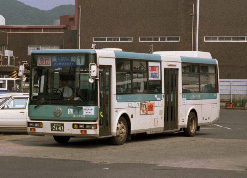 元々は、路面電車（西鉄北九州線）廃止に伴う電車代替バスであった。